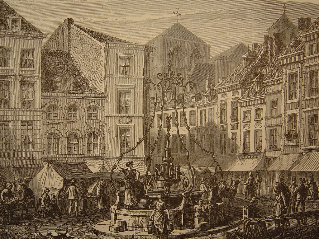 la place de marché à Huy par DeDoncker